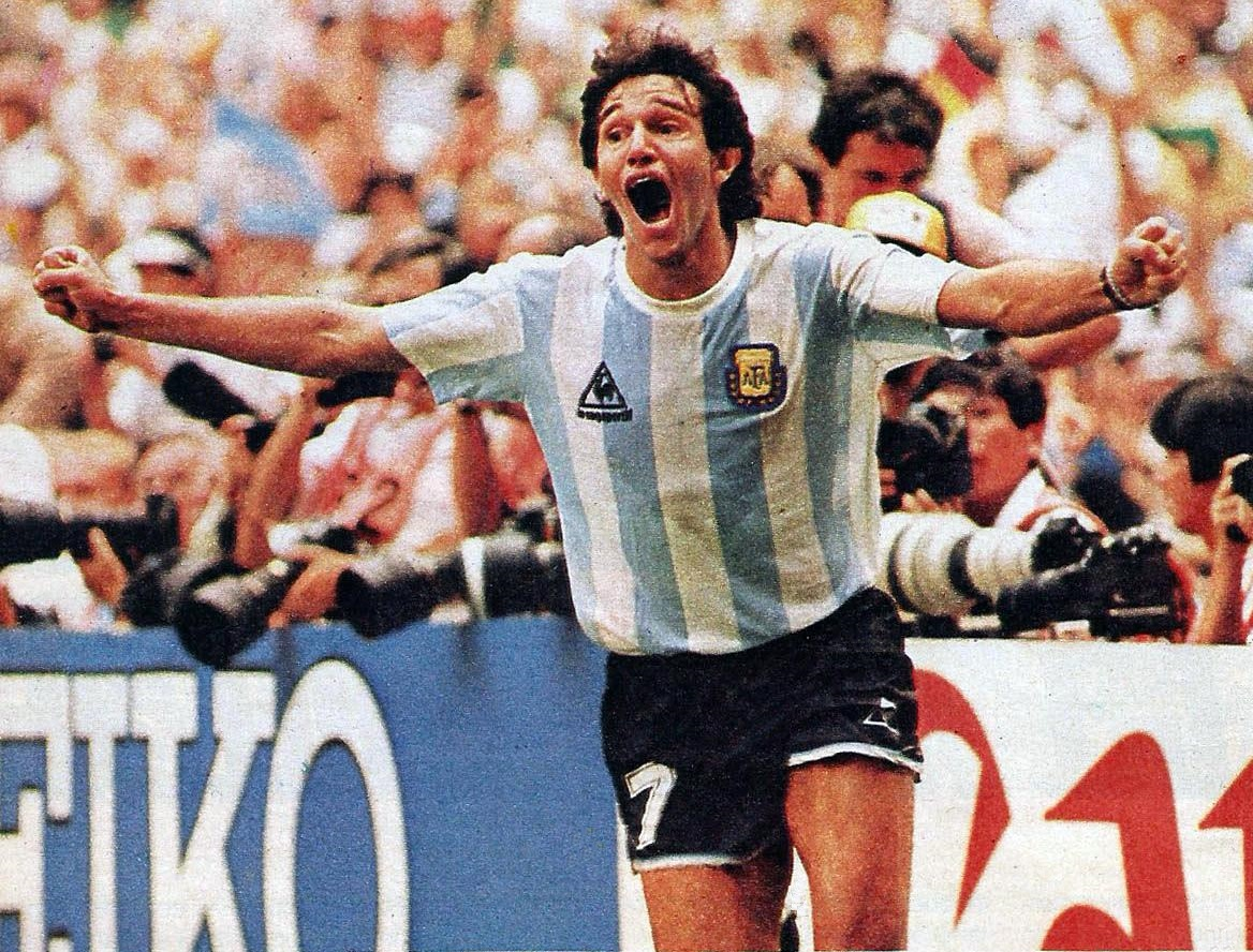 Jorge Burruchaga celebrando gol de Argentina en México 1986.